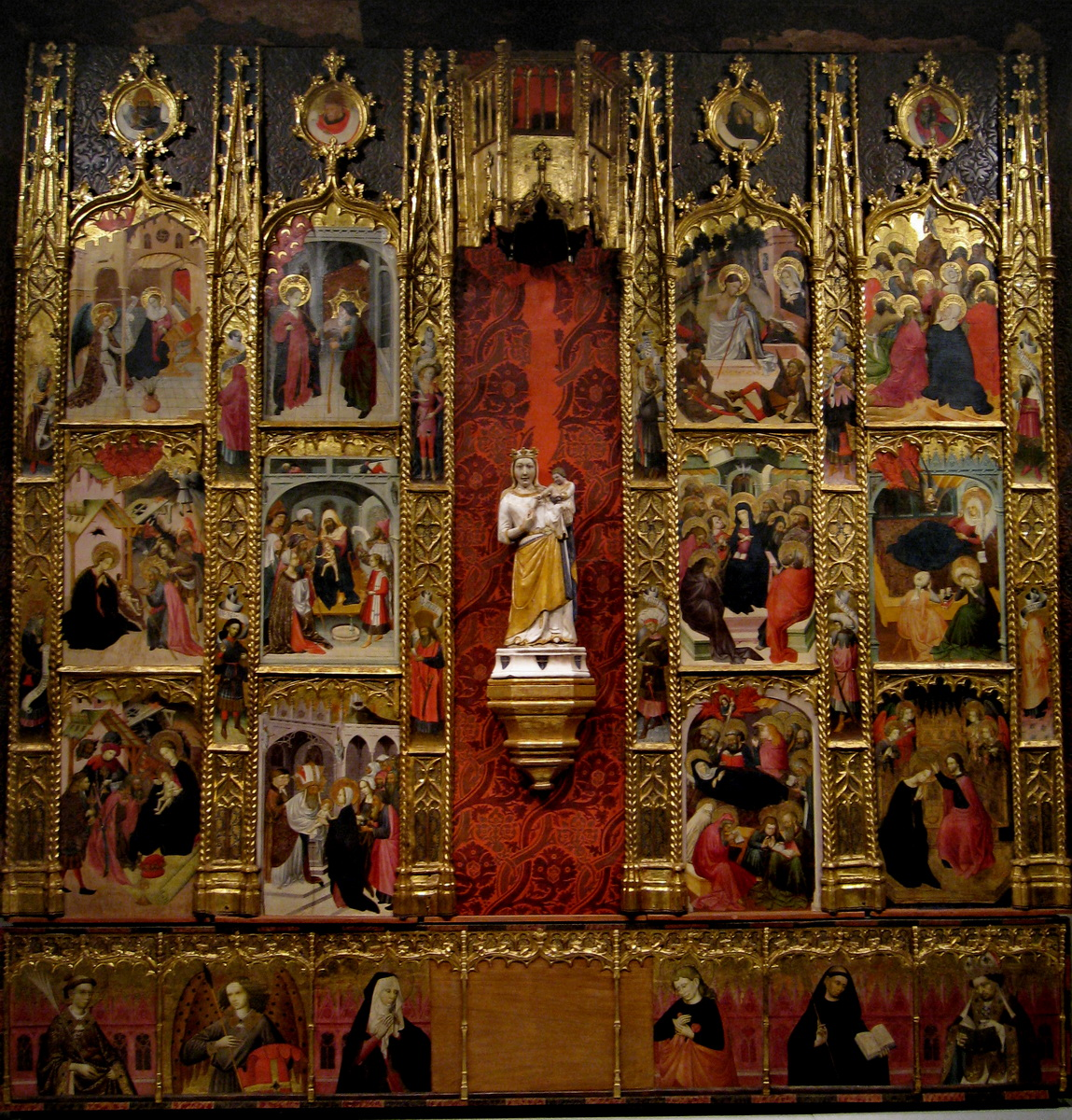 Retaule de la Marededéu de l'Escala. Peça gòtica obra de l'Escala Joan Antigó (1437)